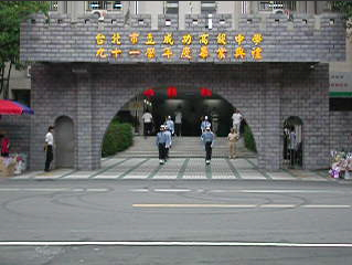 臺北市立成功高級中學91學年度畢業典禮大門，Petertc拍攝於2003年6月13日。